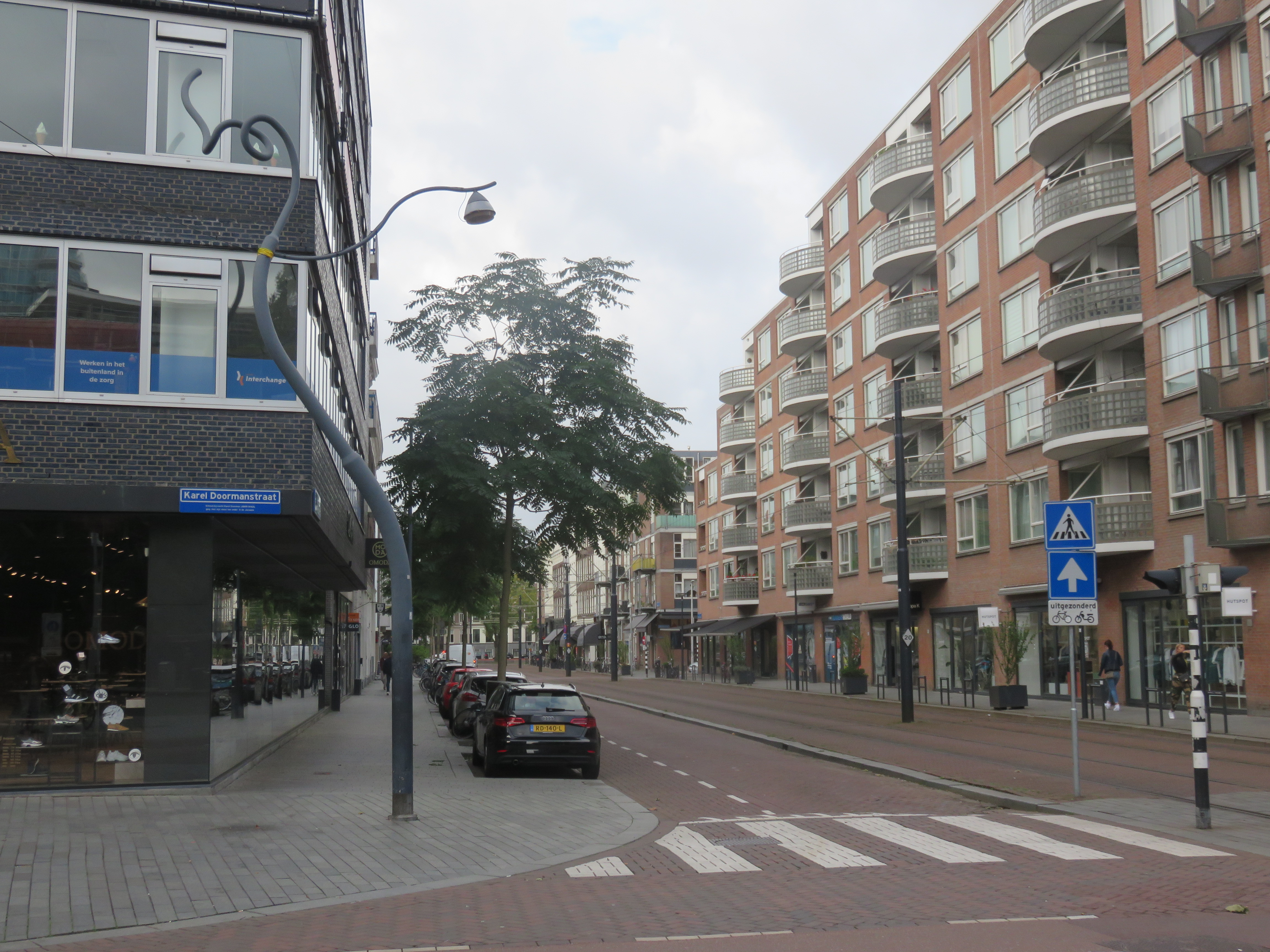 Kraatpaal (1978) op hoek Karel Doormanstraat en Van Oldenbarneveltstraat